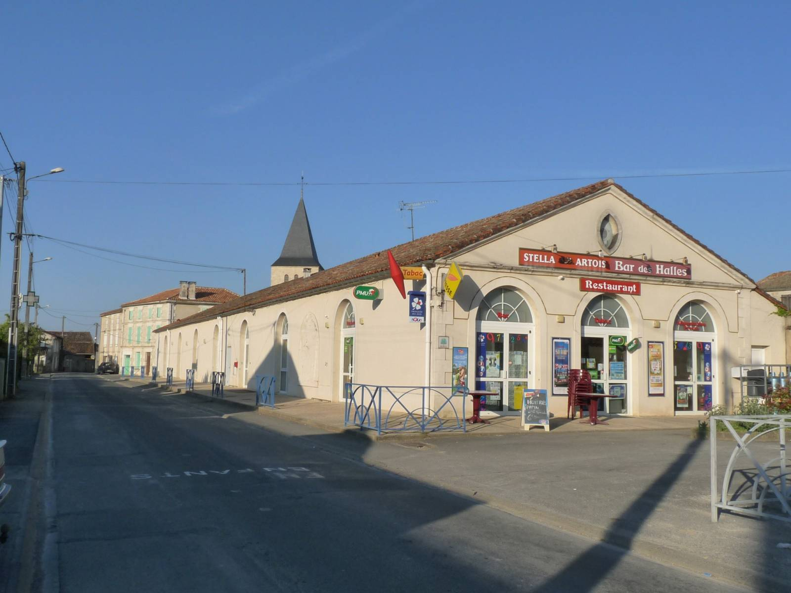 Restaurant-bar des halles, St-Genis-d'Hiersac, Charente, France